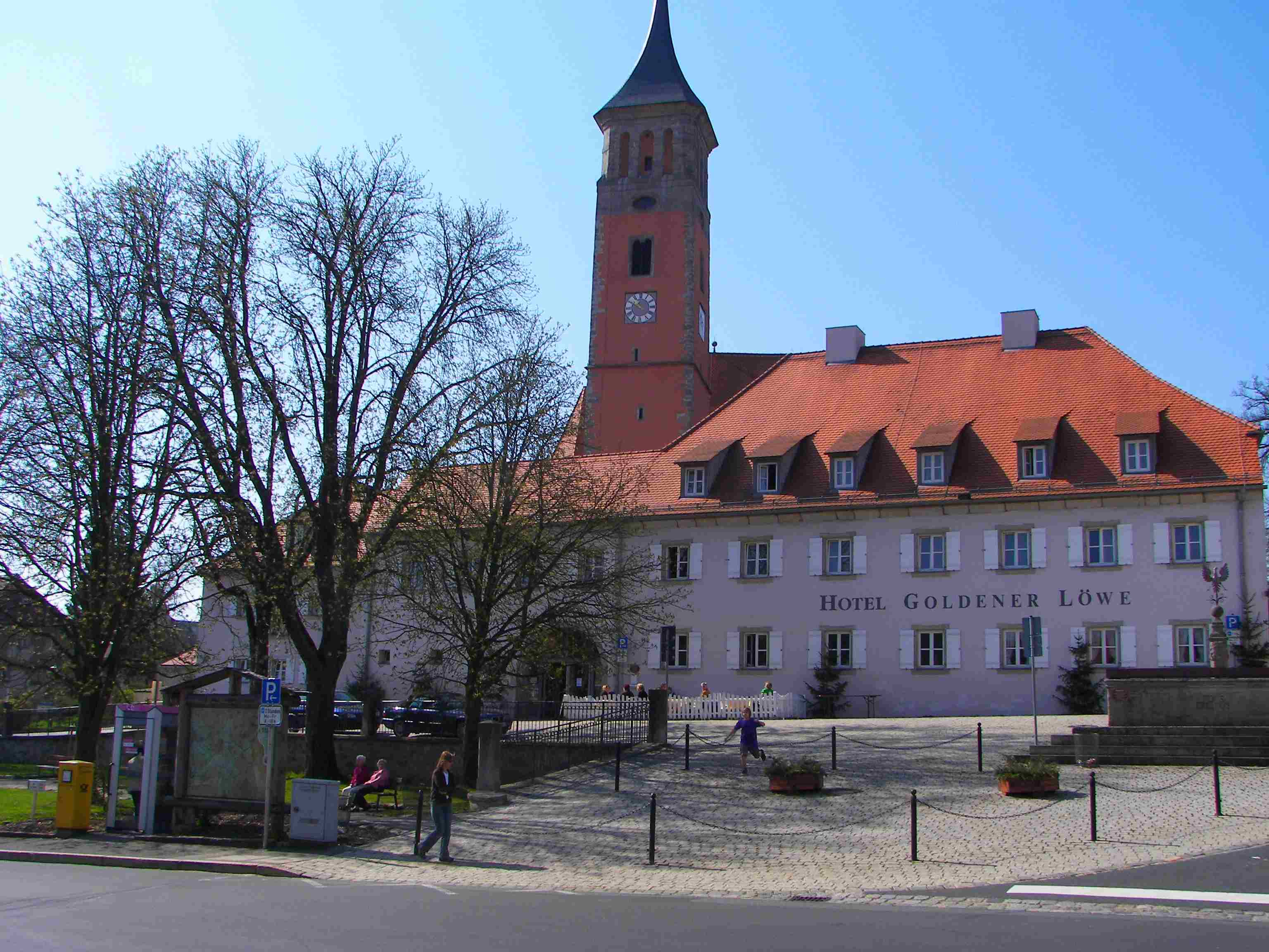 Das Ortszentrum in Floss in der Oberpfalz